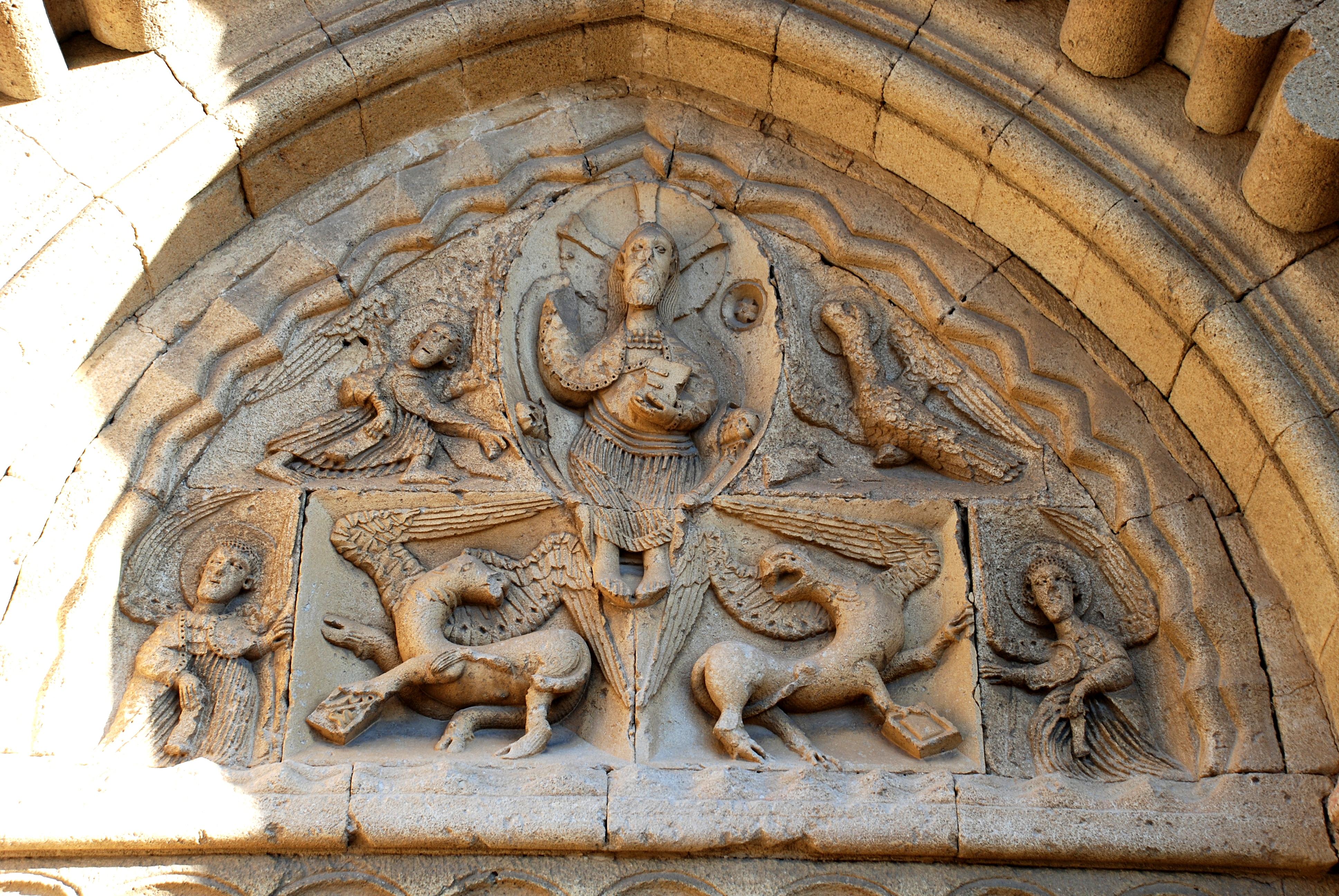 France - Provence - Ganagobie